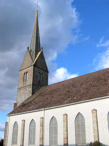 Eglise de l'Immaculée-Conception